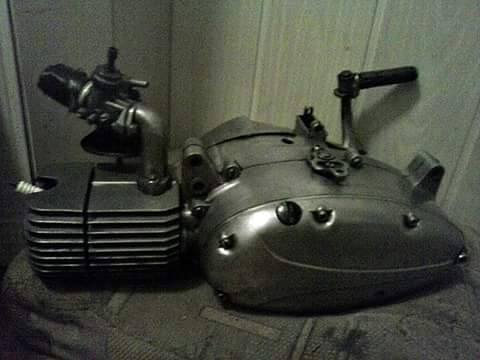 silnik